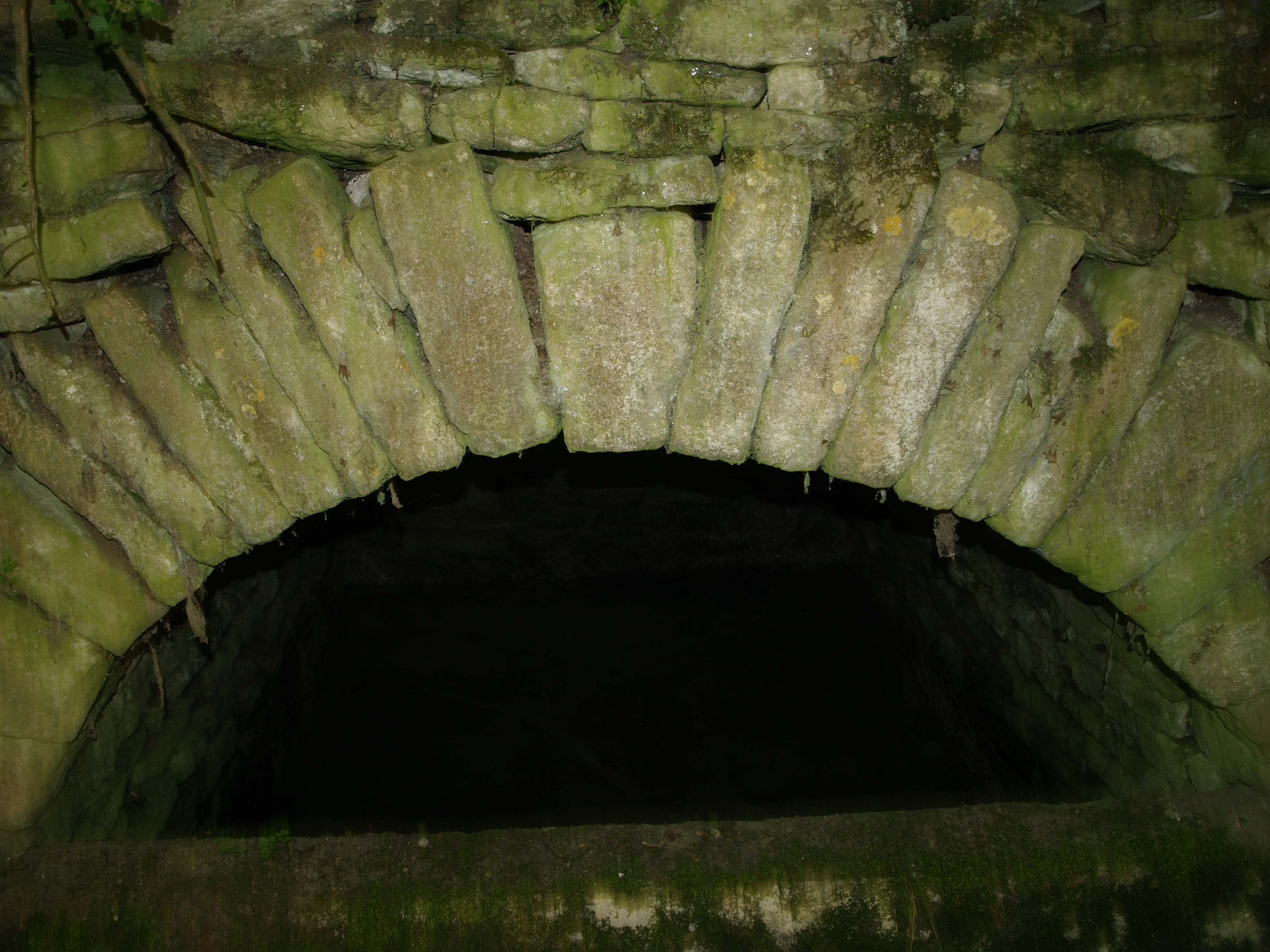 voute de la fontaine saint didier